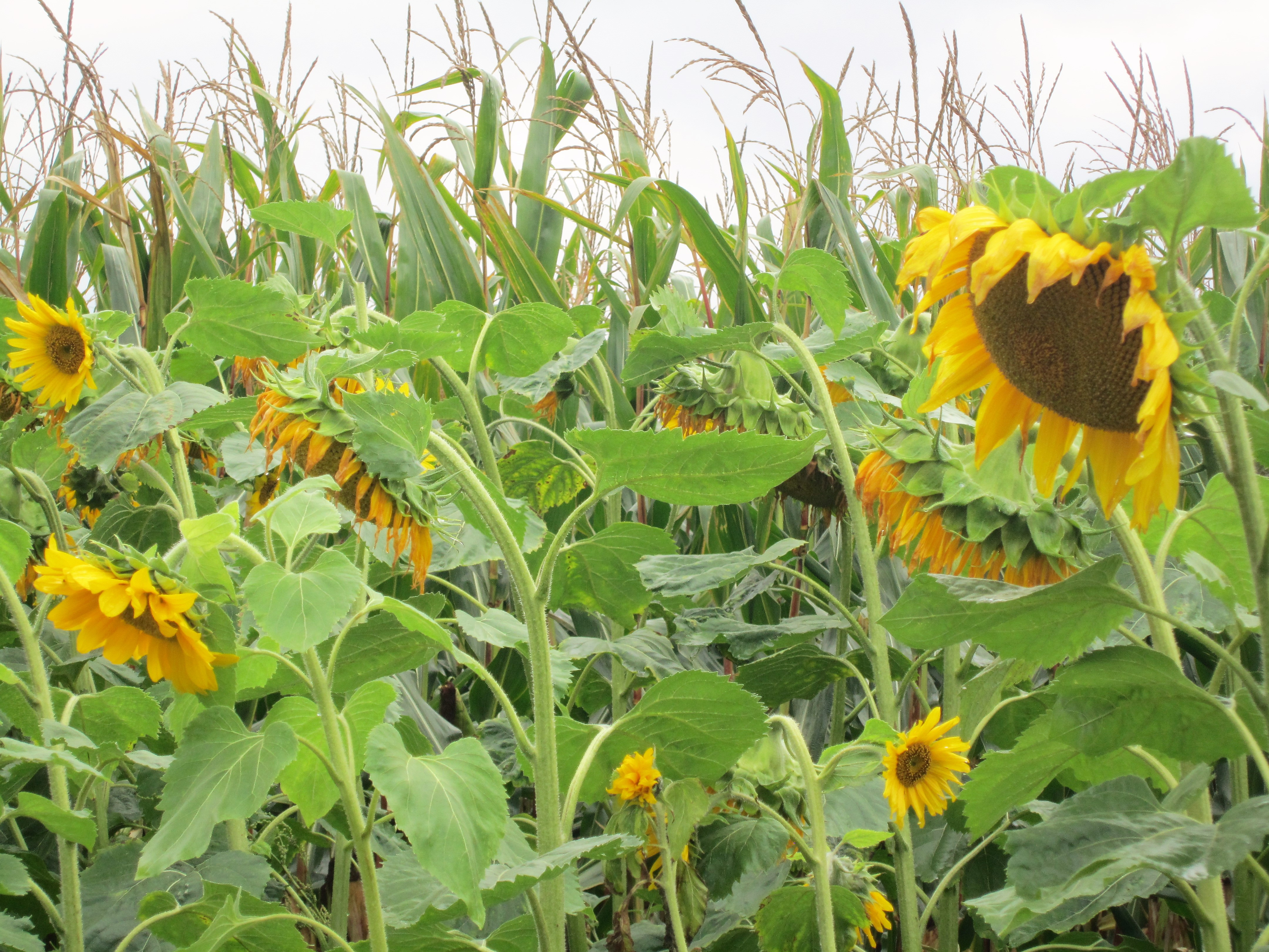 Umsäumung eines Maisfeldes mit Sonnenblumen in Krimpenfort (Stadt Lohne, Landkreis Vechta in Niedersachsen)